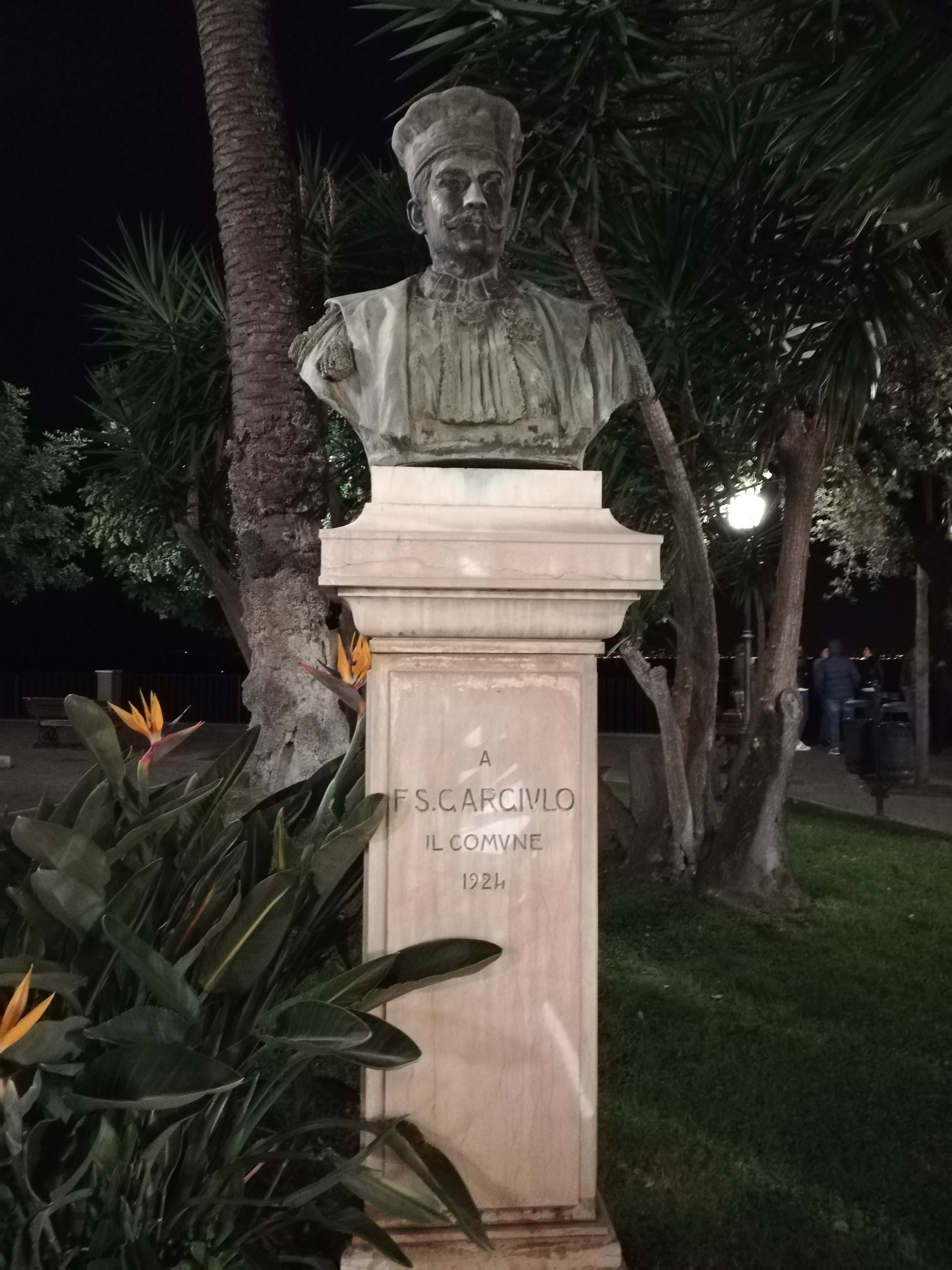 Busto di Francesco Saverio Gargiulo a Sorrento